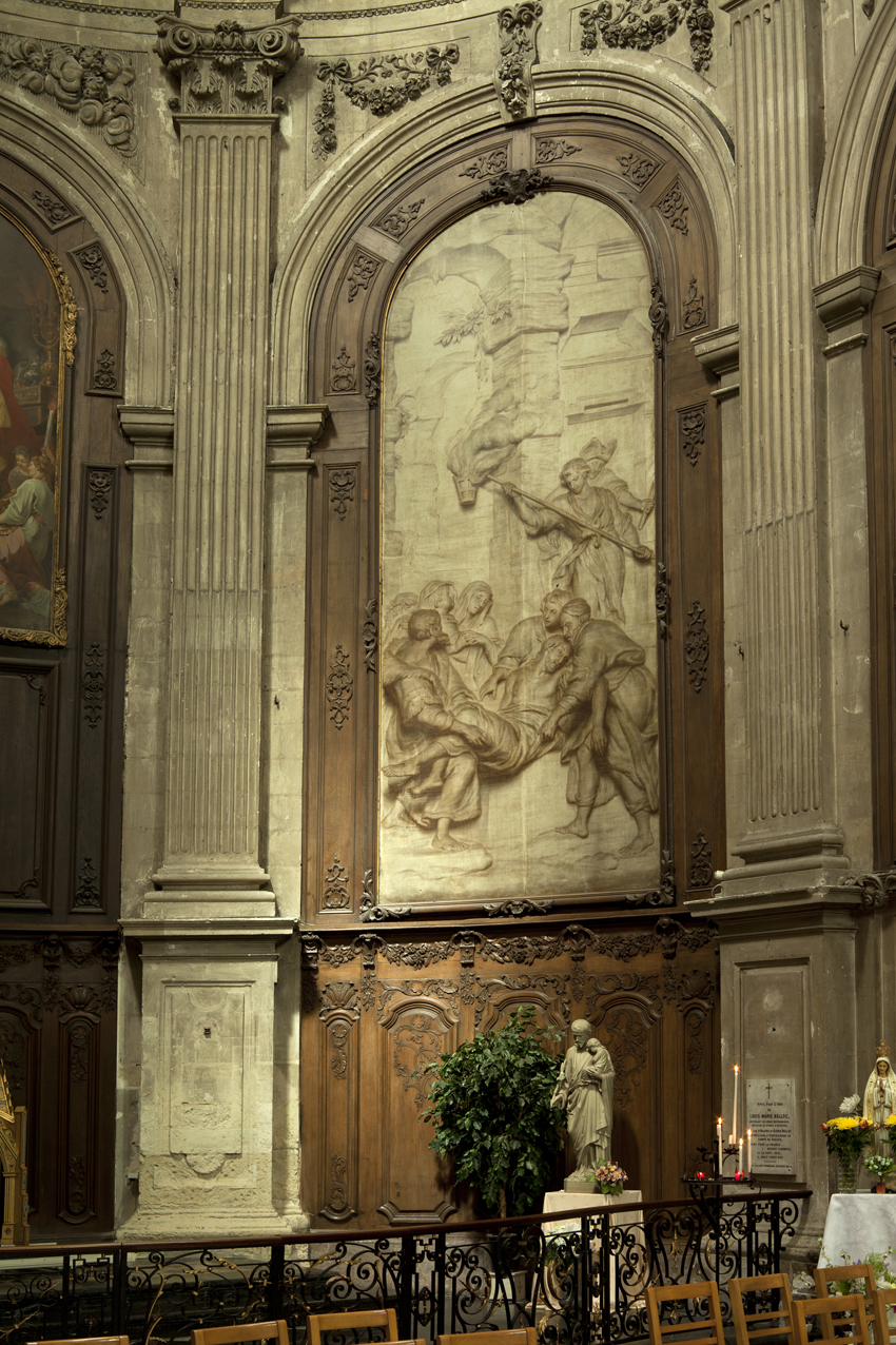 Cathédrale Notre-Dame-de-Grâce de Cambrai (Nord, France), Mise au tombeau, une des quatre peintures en grisaille de Martin-Joseph Geeraerts entre 1756 & 1760, illustrant des épisodes de la Passion du Christ.